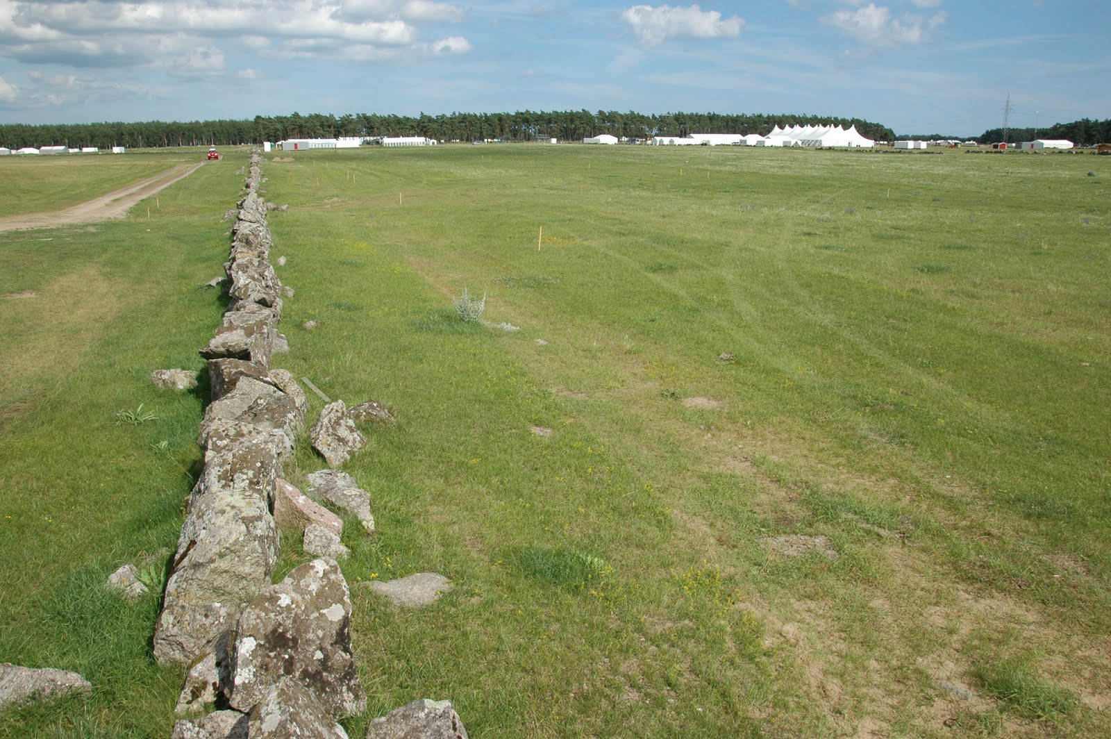 Rinkaby skjutfält, strax före att den 22:a världsjamboreen arrangerades på fältet